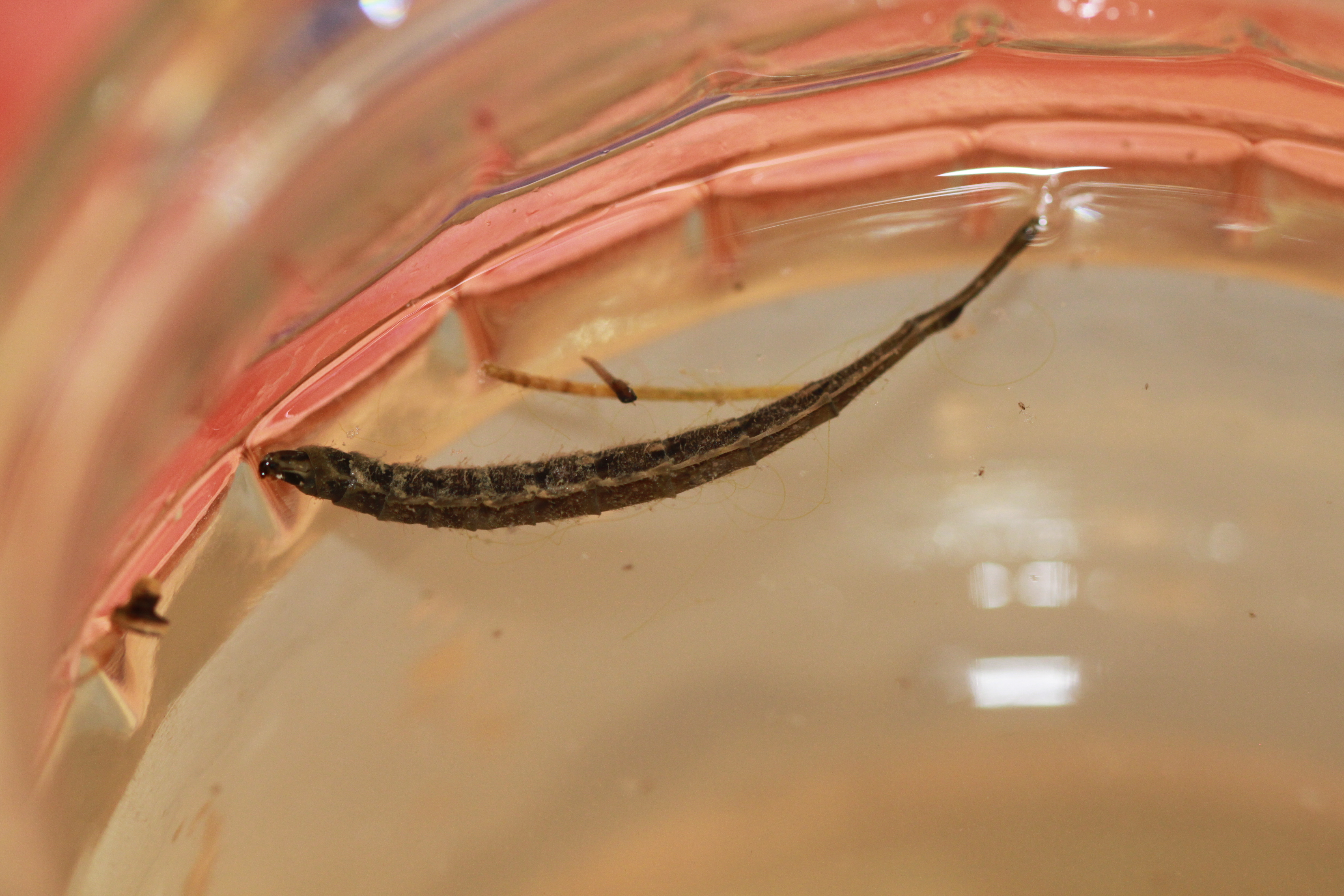 wahrscheinlich eine Dipterenlarve aus der Gattung Ptychoptera (Fam. der Faltenmücken)